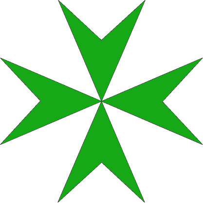 Armoiries de l'ordre de Saint-Lazare Auteur:Cornelis